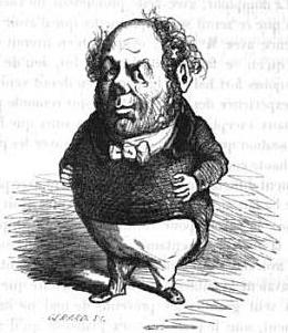 Caricature de Henri Georges Boulay de la Meurthe (1795-1858) par Cham.